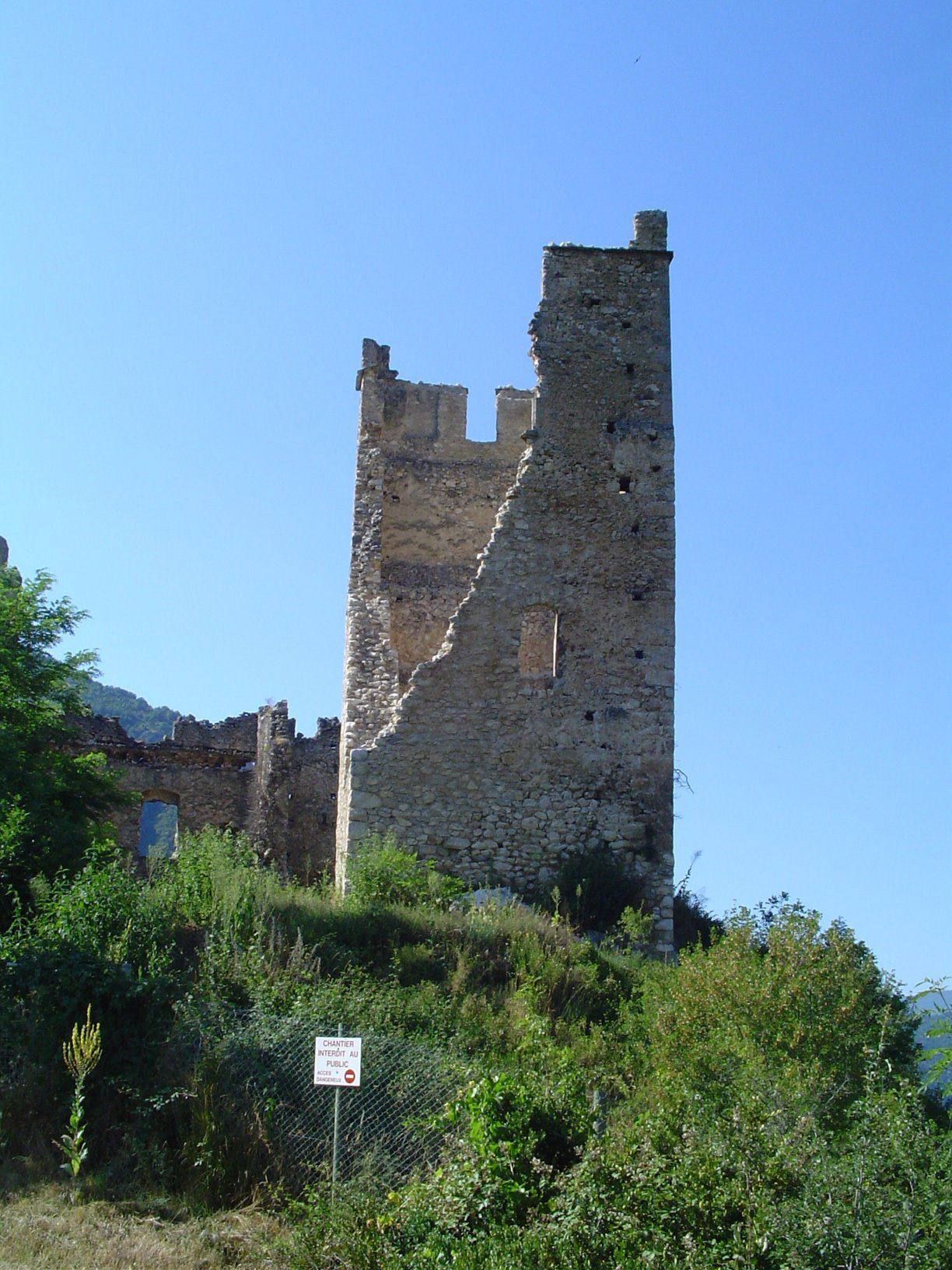 Château de Miglos (France,09)